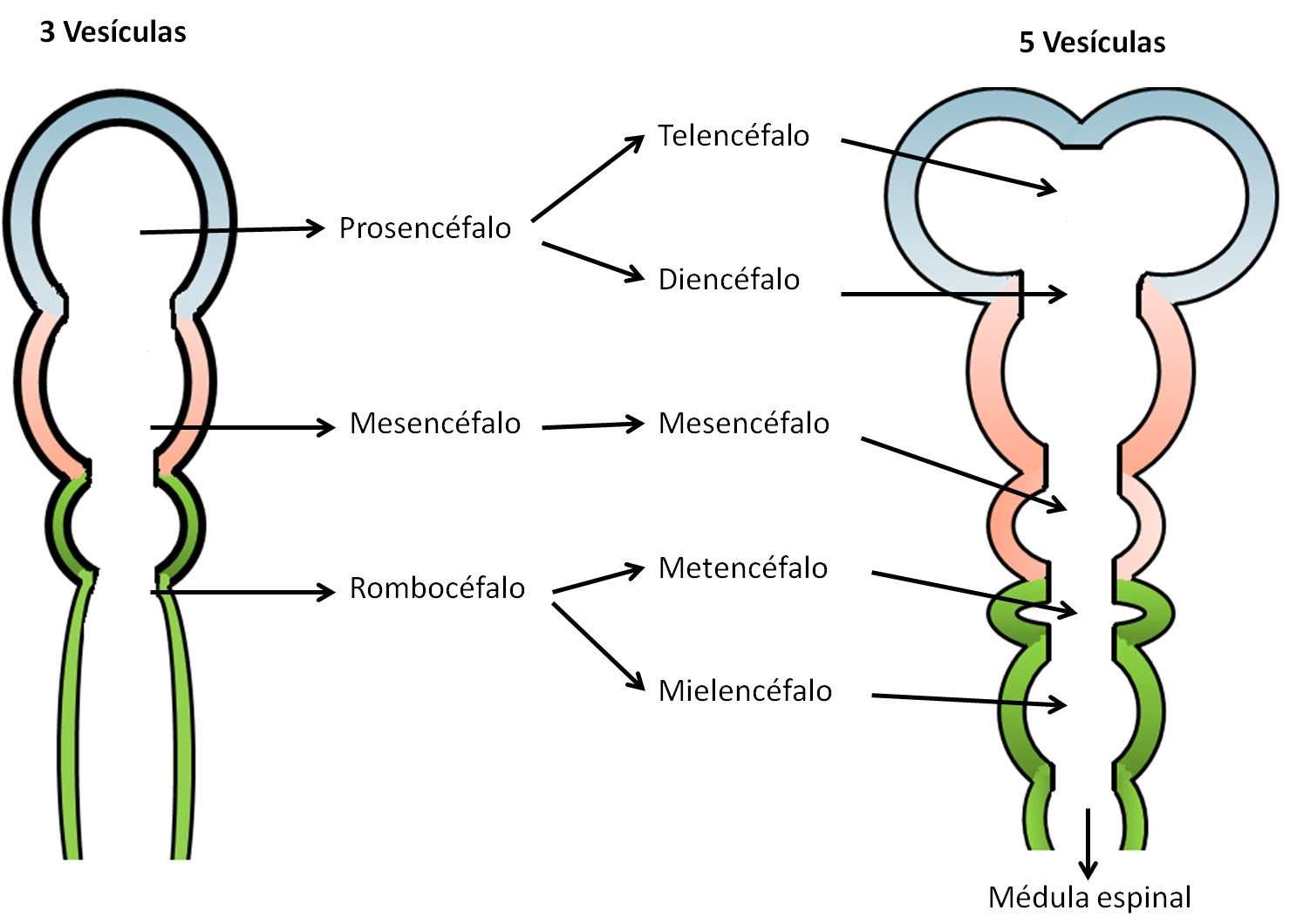 Tomado y modificado de Gilbert (2005).